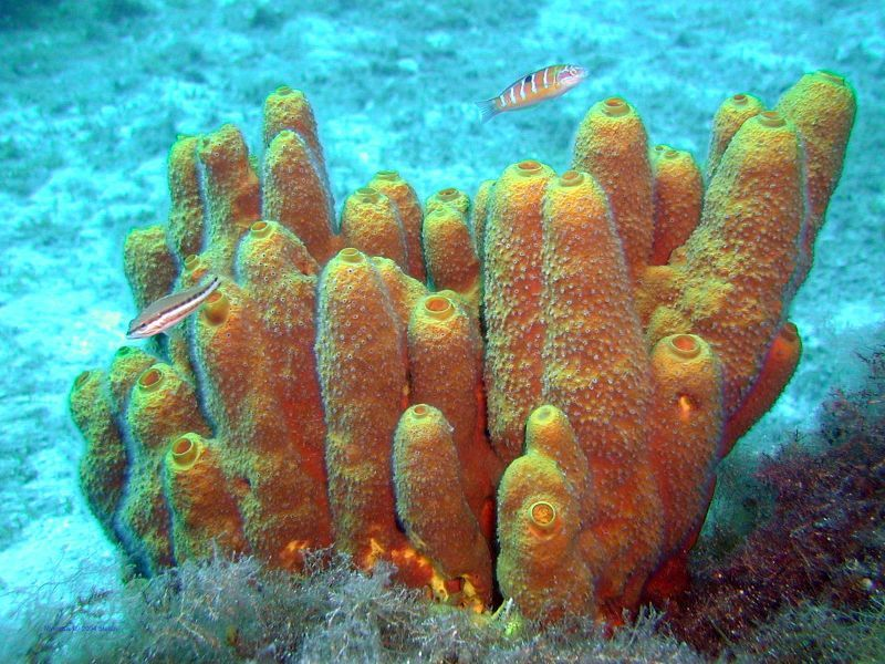 Gelber Schwamm an der Südküste von Mykonos